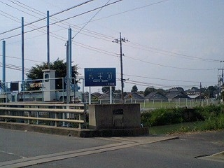 埼玉県川越市牛子・九十川（共栄橋・牛子堰）